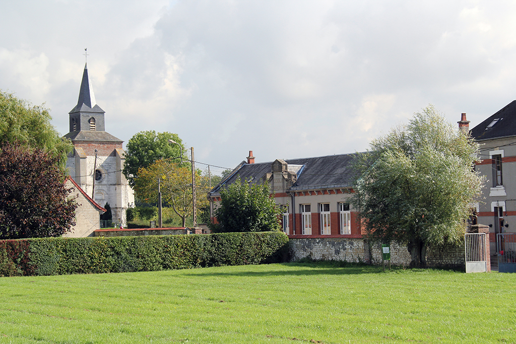 Tigny-Noyelle, église, école, mairie